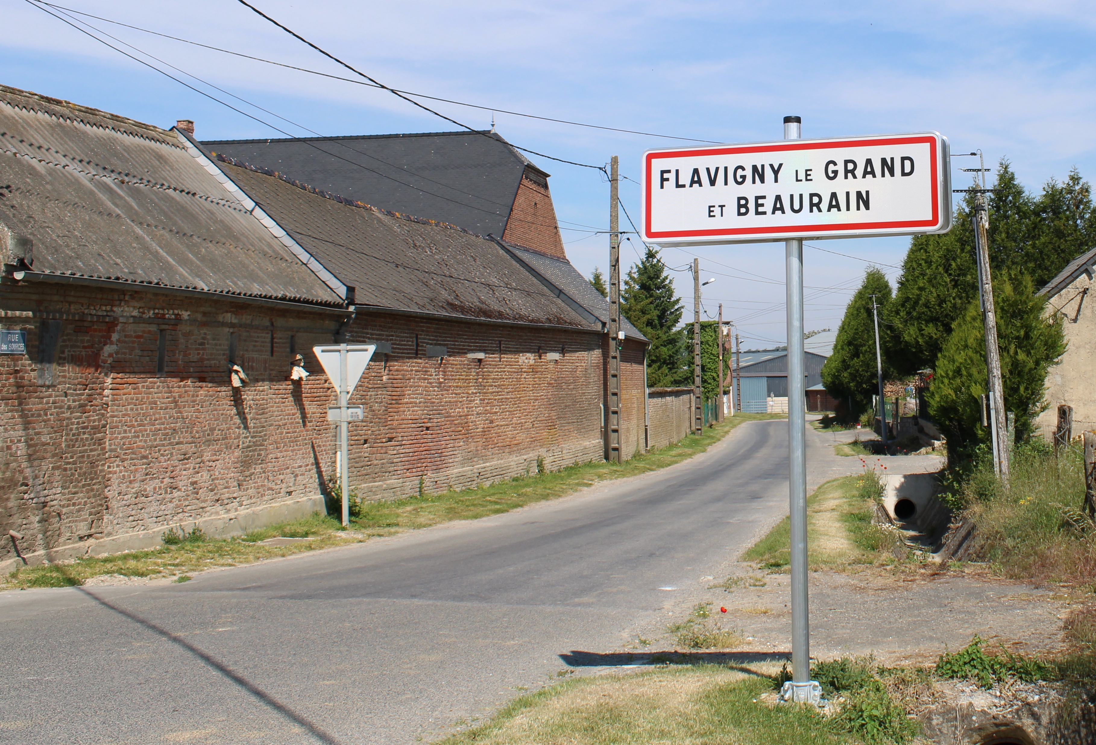 Entrée du village